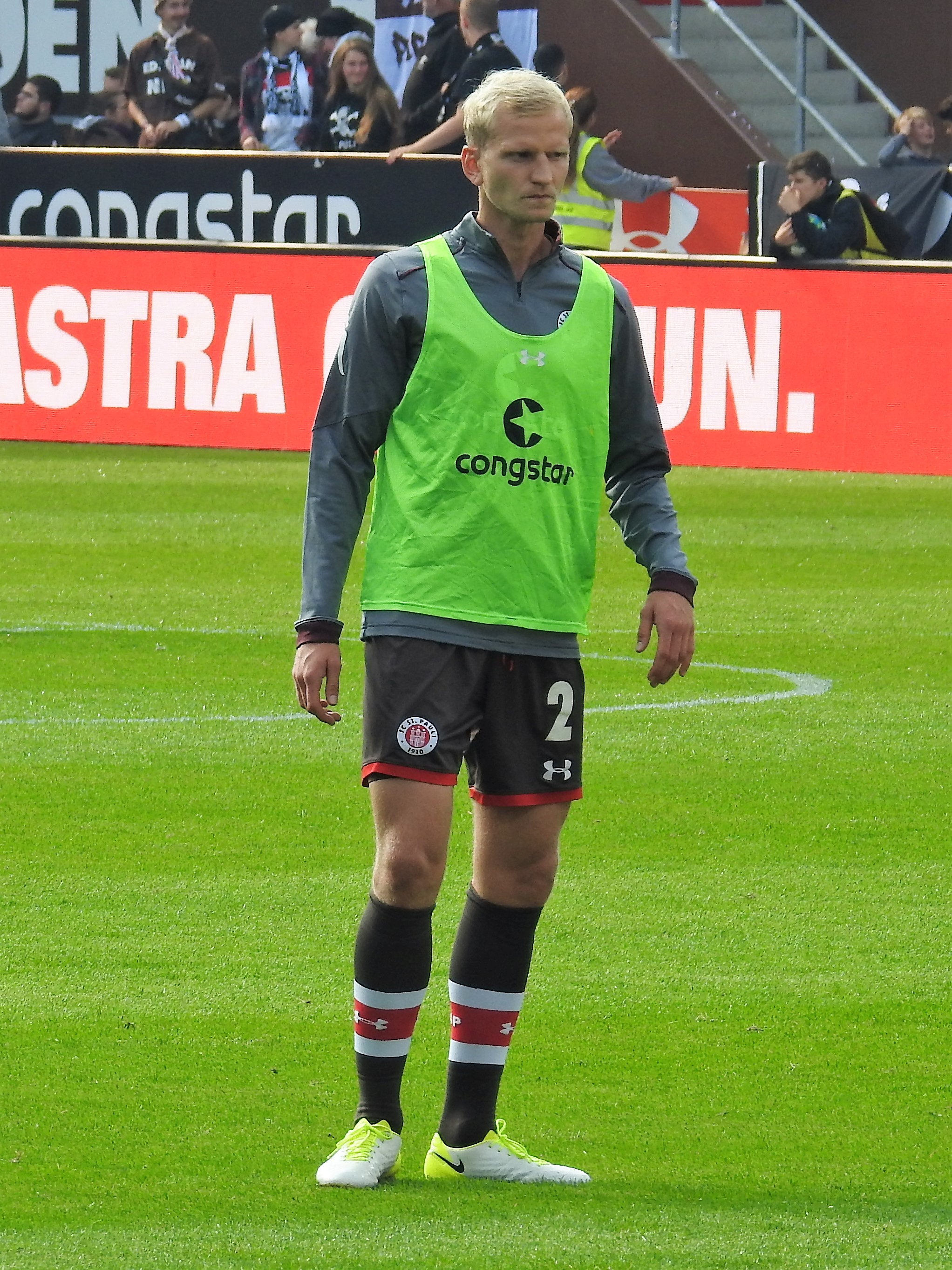 Schoppenhauer, Clemens FCSP